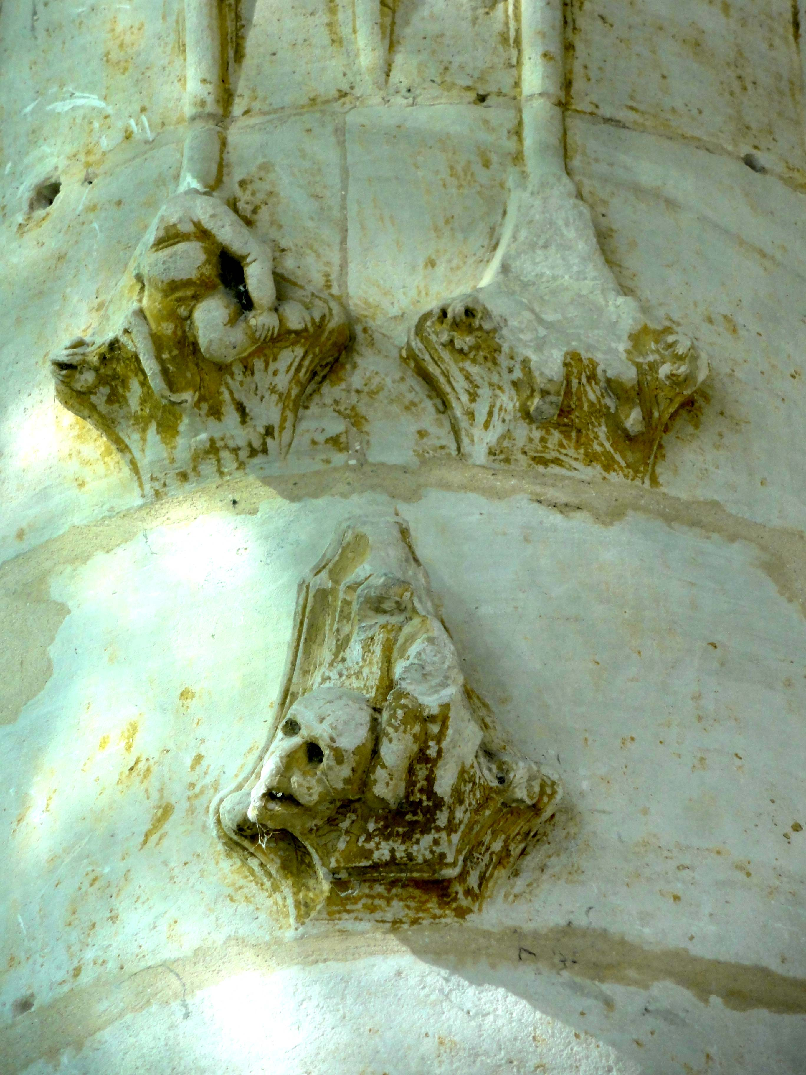 Culs-de-lampe - voir titre.